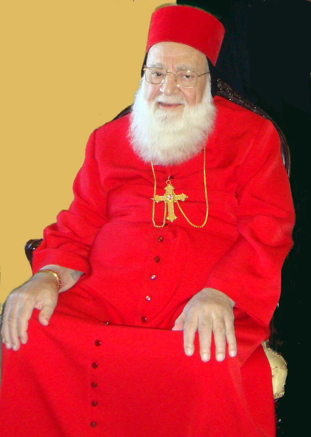 ഇഗ്നാത്തിയോസ്‌ സാഖാ പ്രഥമൻ ഇവാസ്